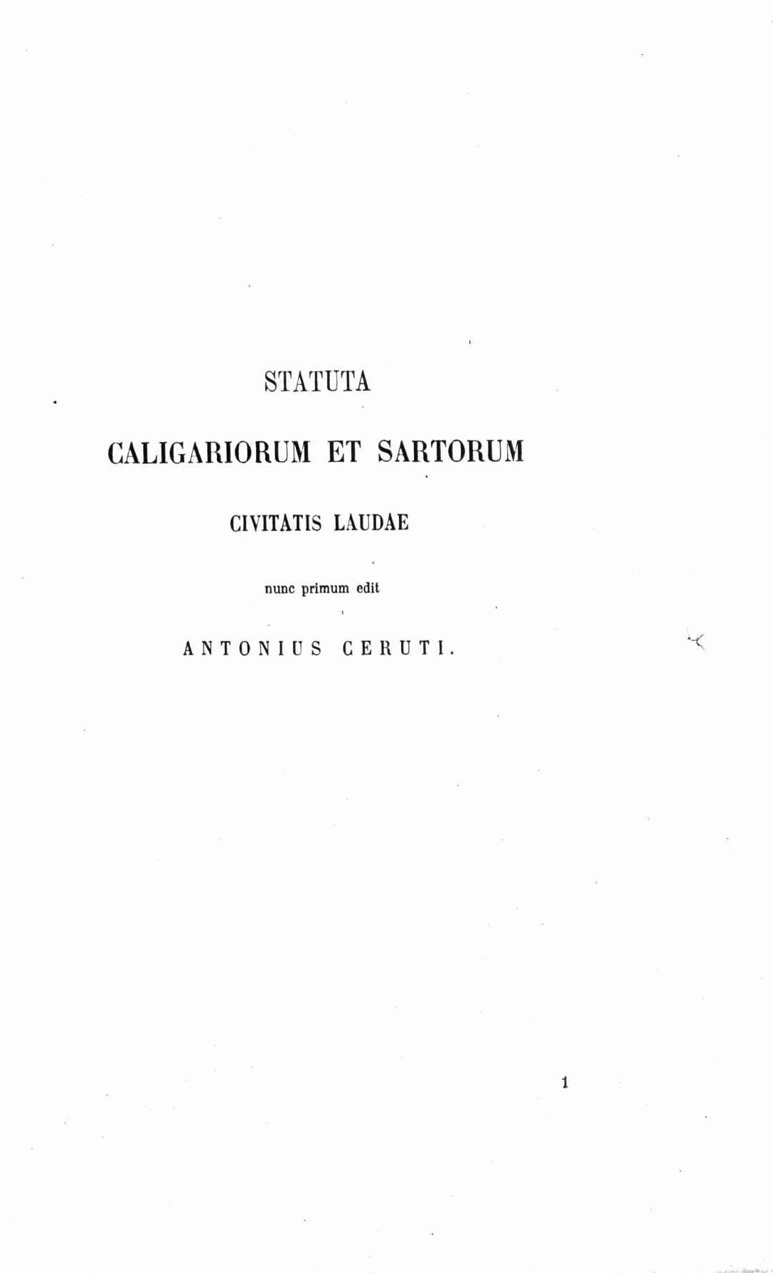 Frontespizio